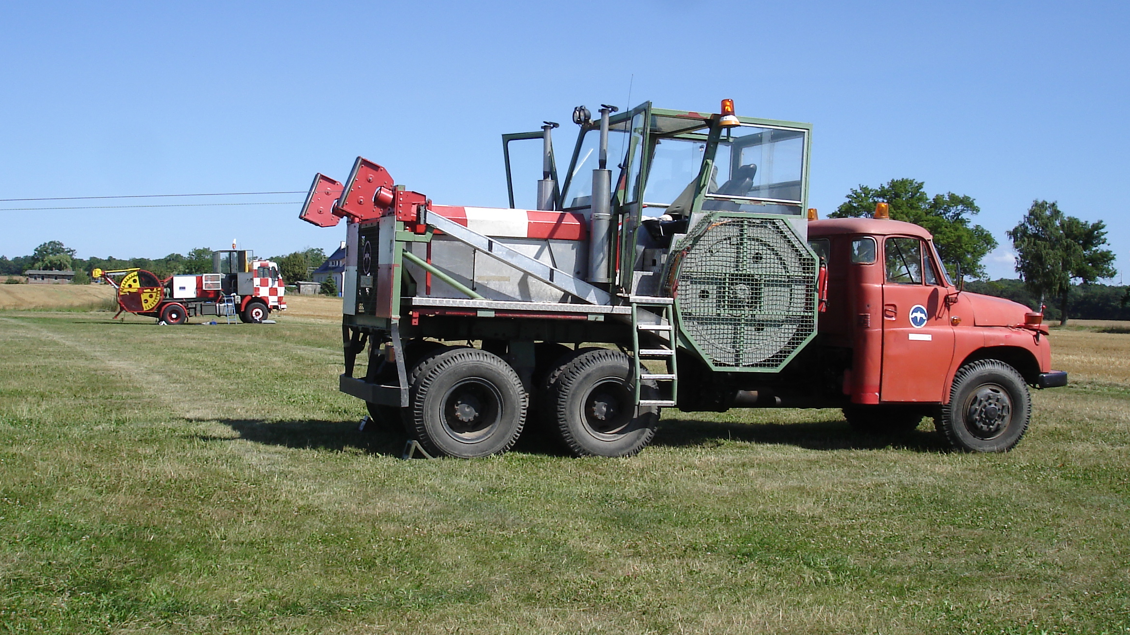 Wechselseitige Nutzung zweier Doppeltrommel-Startwinden bei der Berliner Landesmeisterschaft im Segelflug 2013 auf dem Segelfluggelände Kammermark